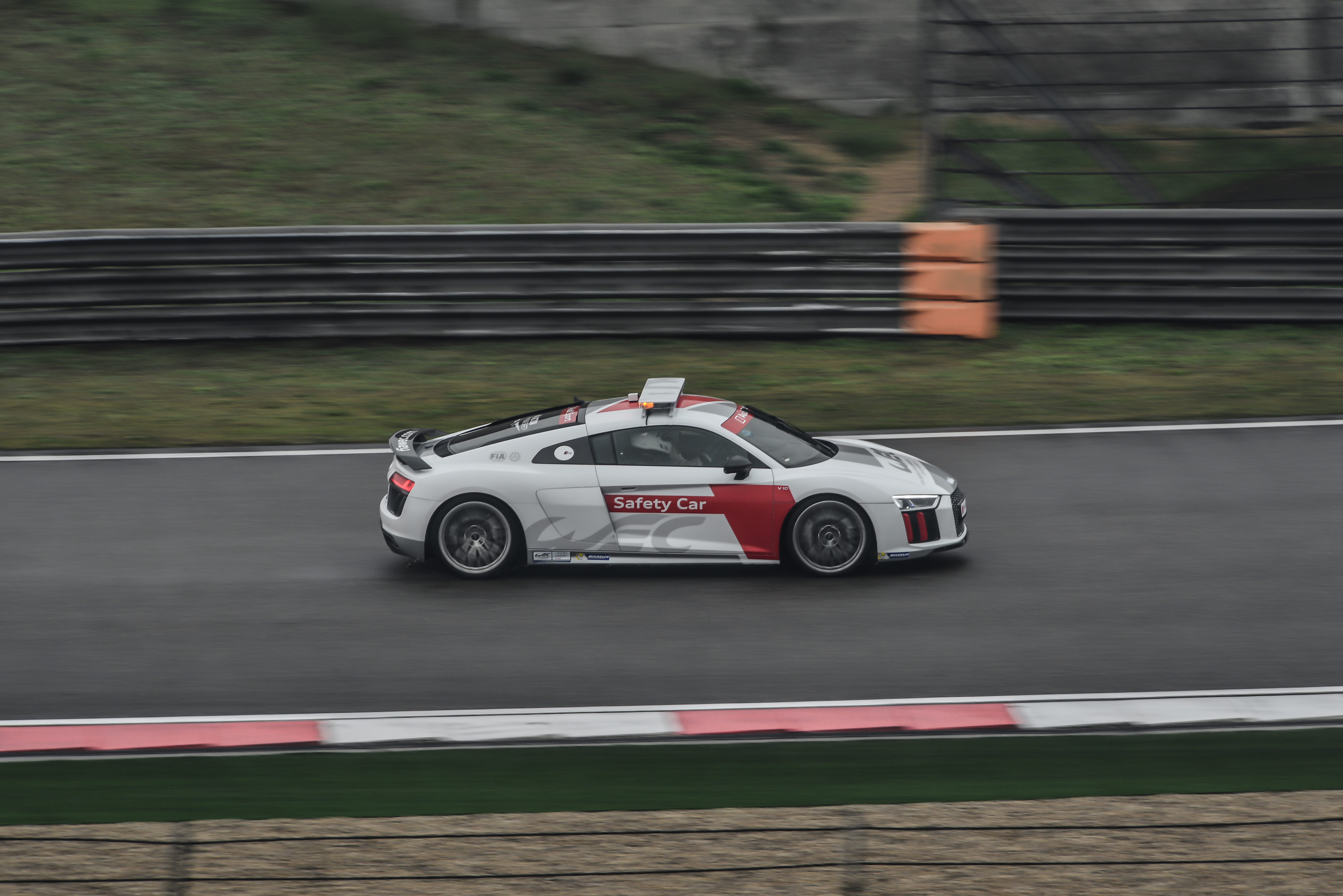 WEC, Shanghai, 2015